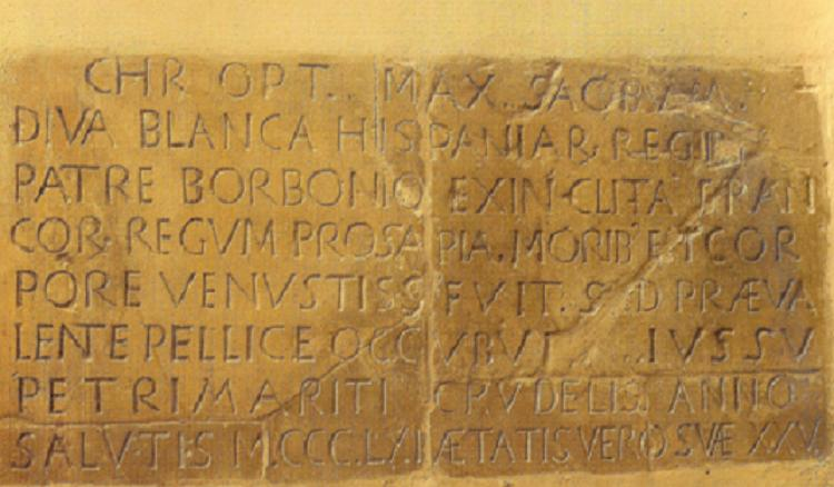 Lápida sepulcral de la reina Doña Blanca de Borbón, esposa de Pedro I el Cruel, rey de Castilla y León. Se encuentra en el convento de San Francisco de Jerez de la Frontera, (provincia de Cádiz).